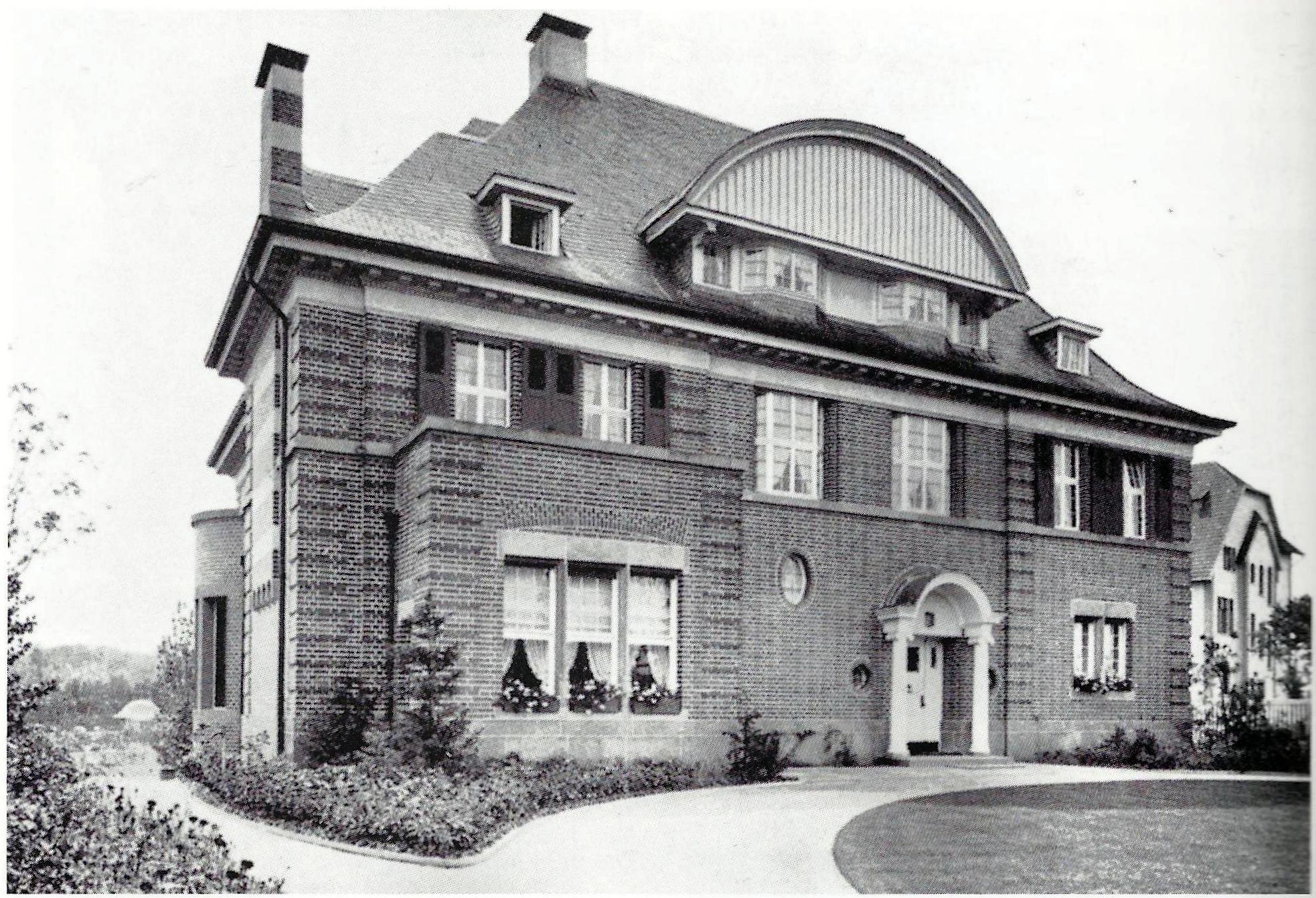 Villa (erbaut 1911/12, 1950/51 wiederaufgebaut), Lindenallee 43, Köln-Marienburg